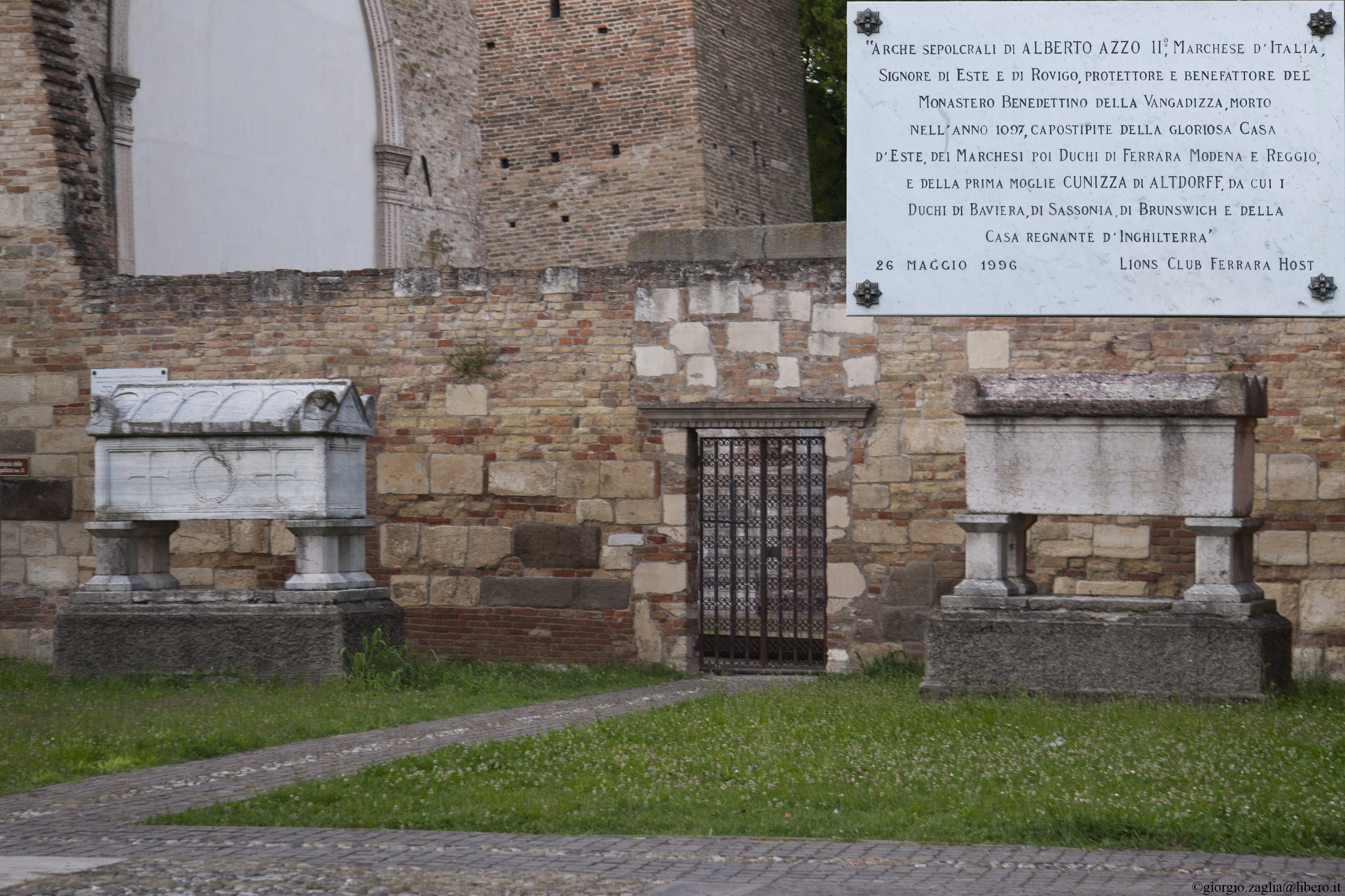 Arche sepolcrali di Alberto Azzo II e della moglie Cunizza di Altdorff, dettaglio targa commemorativa, Abbazia della Vangadizza, Badia Polesine (RO) dichiaro di essere autore dell'opera di cui cedo a Wikipedia i diritti, pubblicata il 30/07/2013